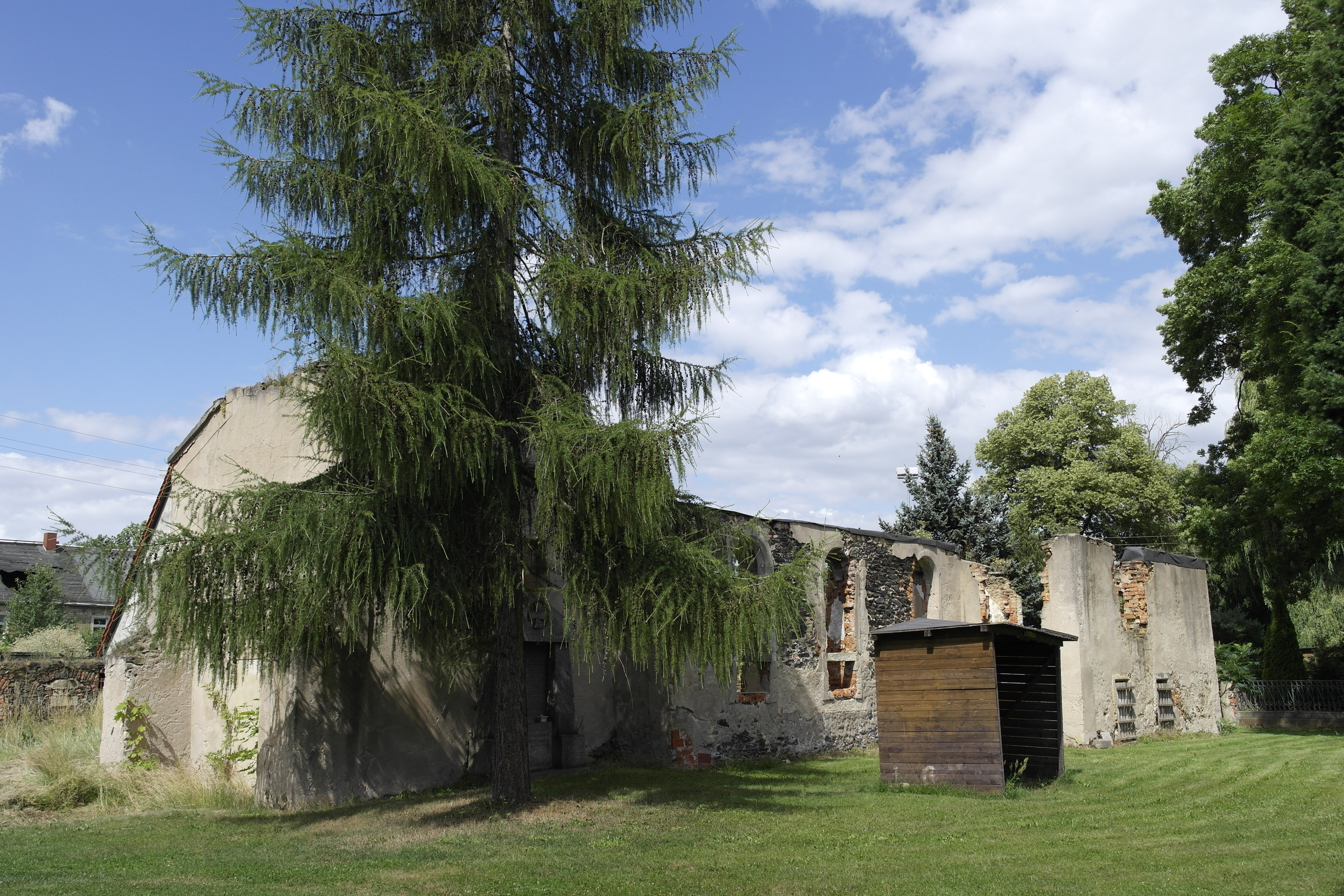 Kirche in Canitz (Liebschützberg). In DDR_Zeiten verfallen.